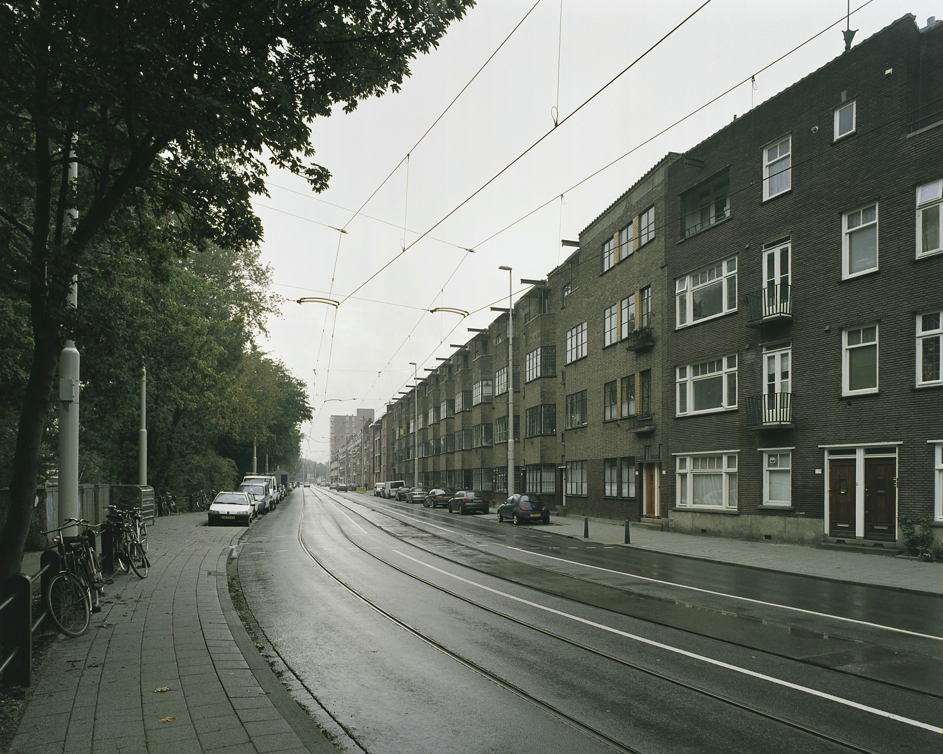 Straatbeeld